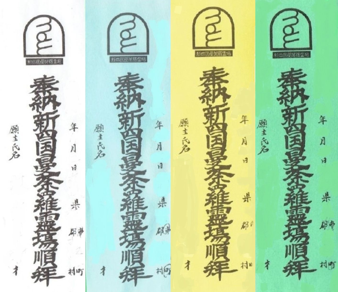 新四国曼荼羅霊場の納札